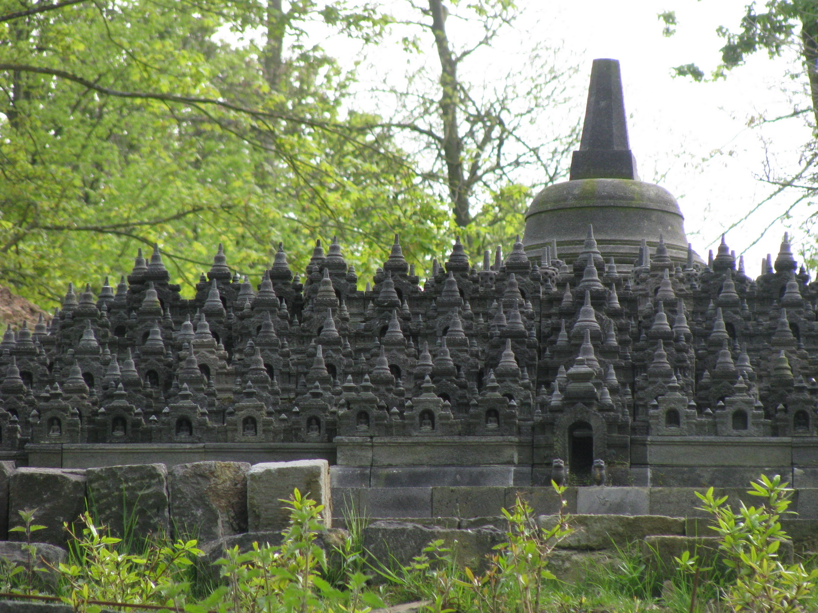 Pairi Daiza. Borobudur